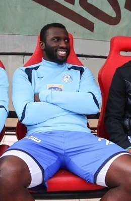 نیمکت ذخیره‌های استقلال در بازی مقابل پیکان در زمستان ۹۷